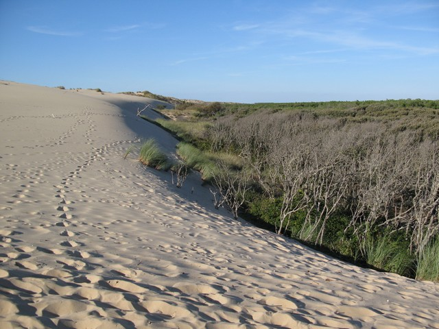 La courbe